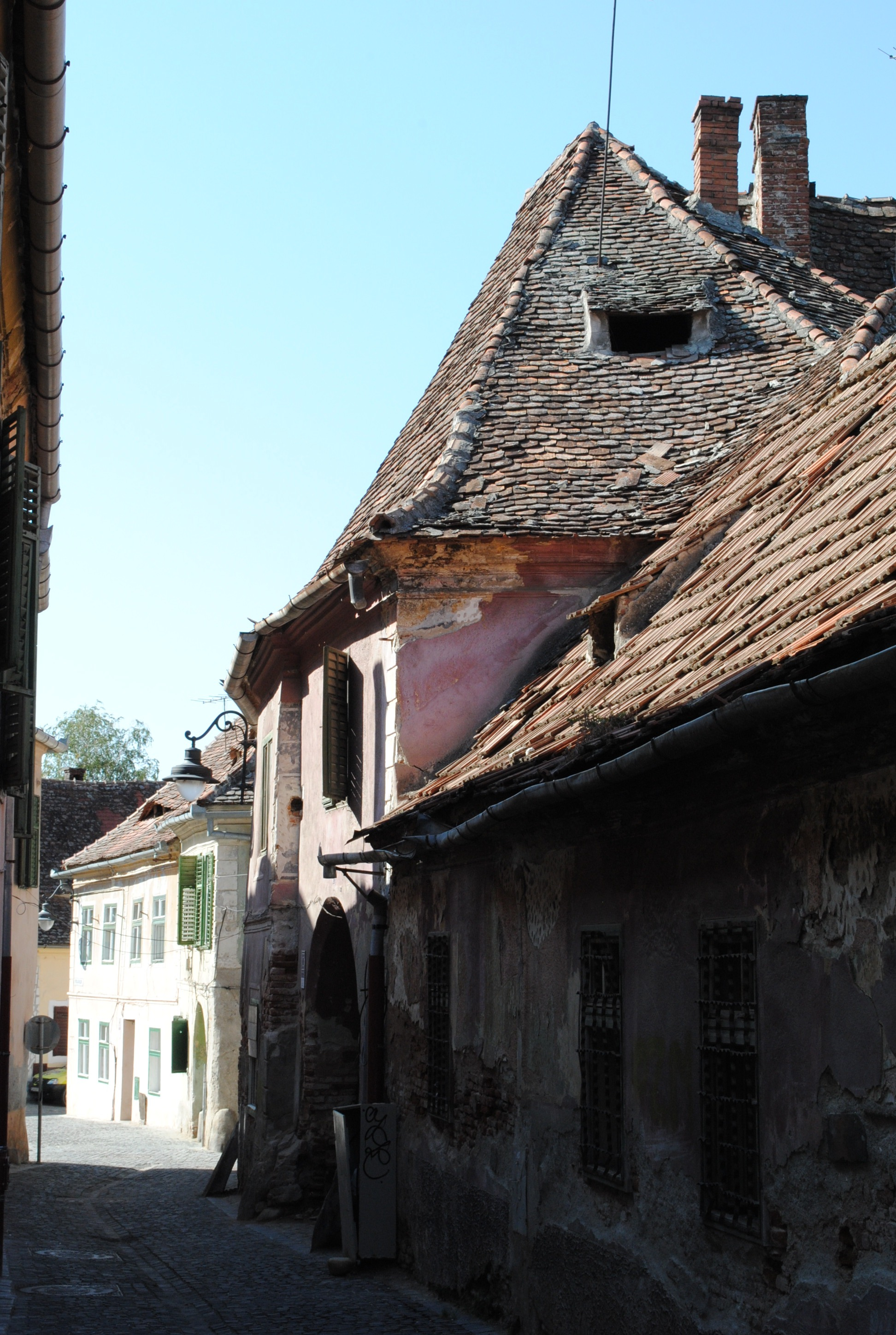 Casă, sec. XV - XVI, sec. XVIII